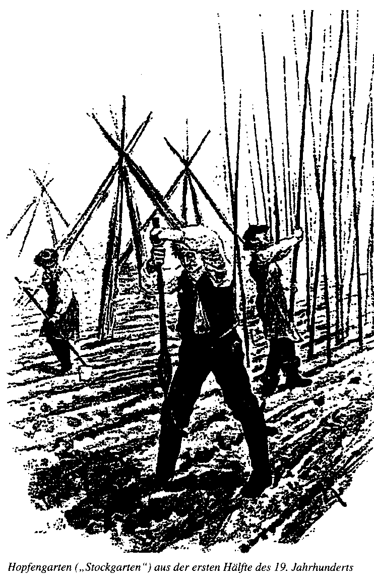 Hopfengarten ("Stockgarten") aus der ersten Hälfte des 19.Jahrhunderts